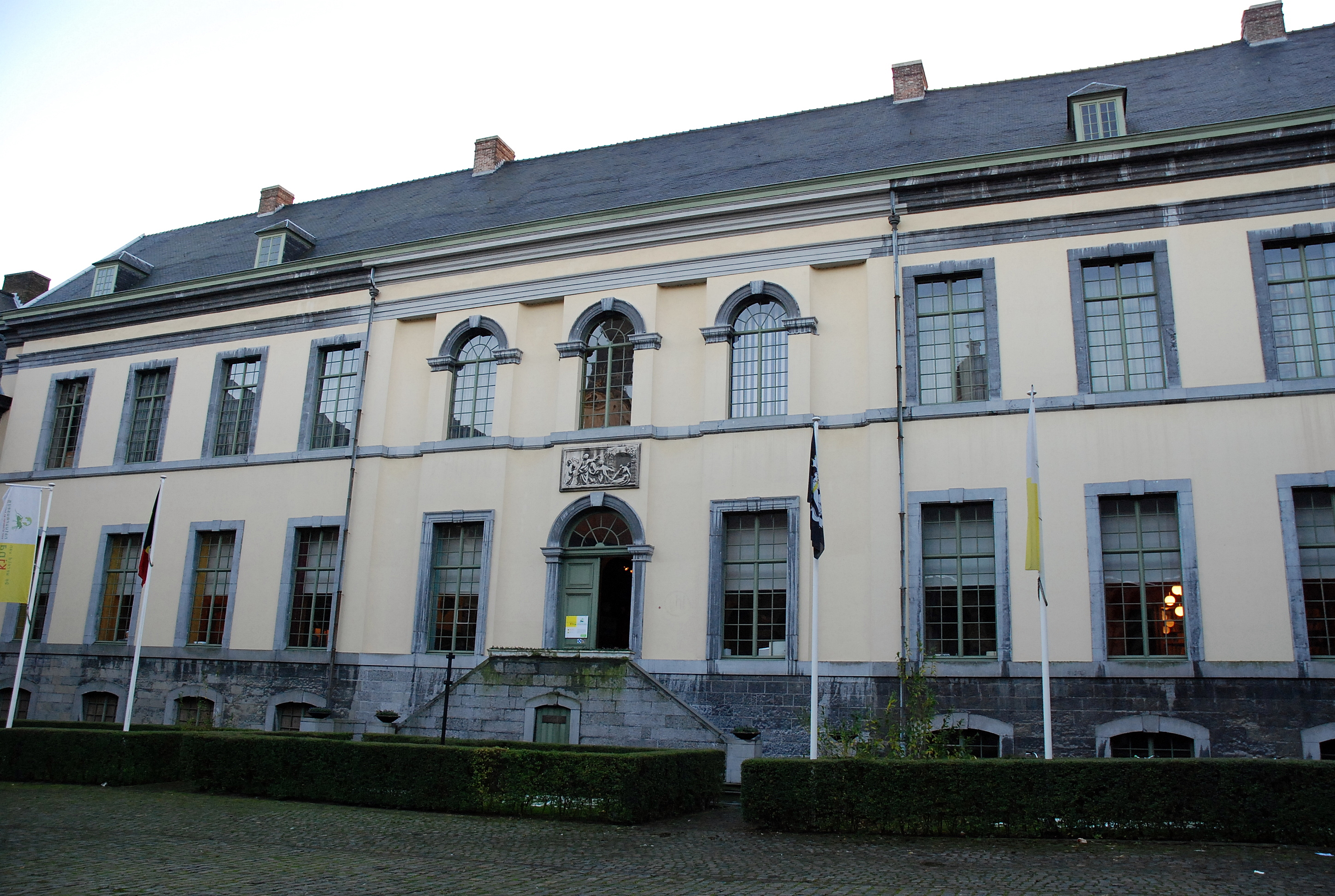 Museum "de wereld van Kina" in gent, België